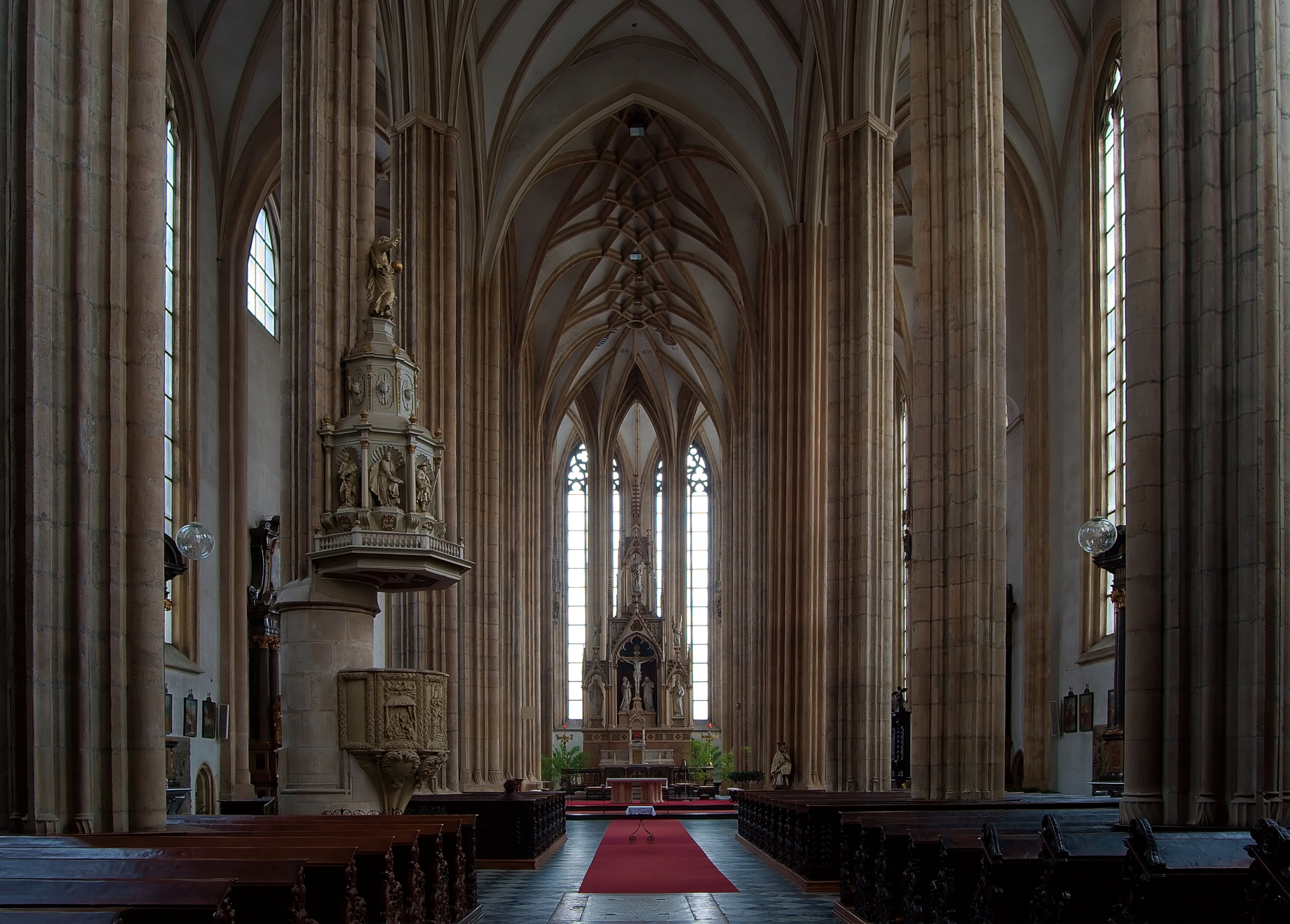 Město Brno - interiér kostela Sv. Jakuba